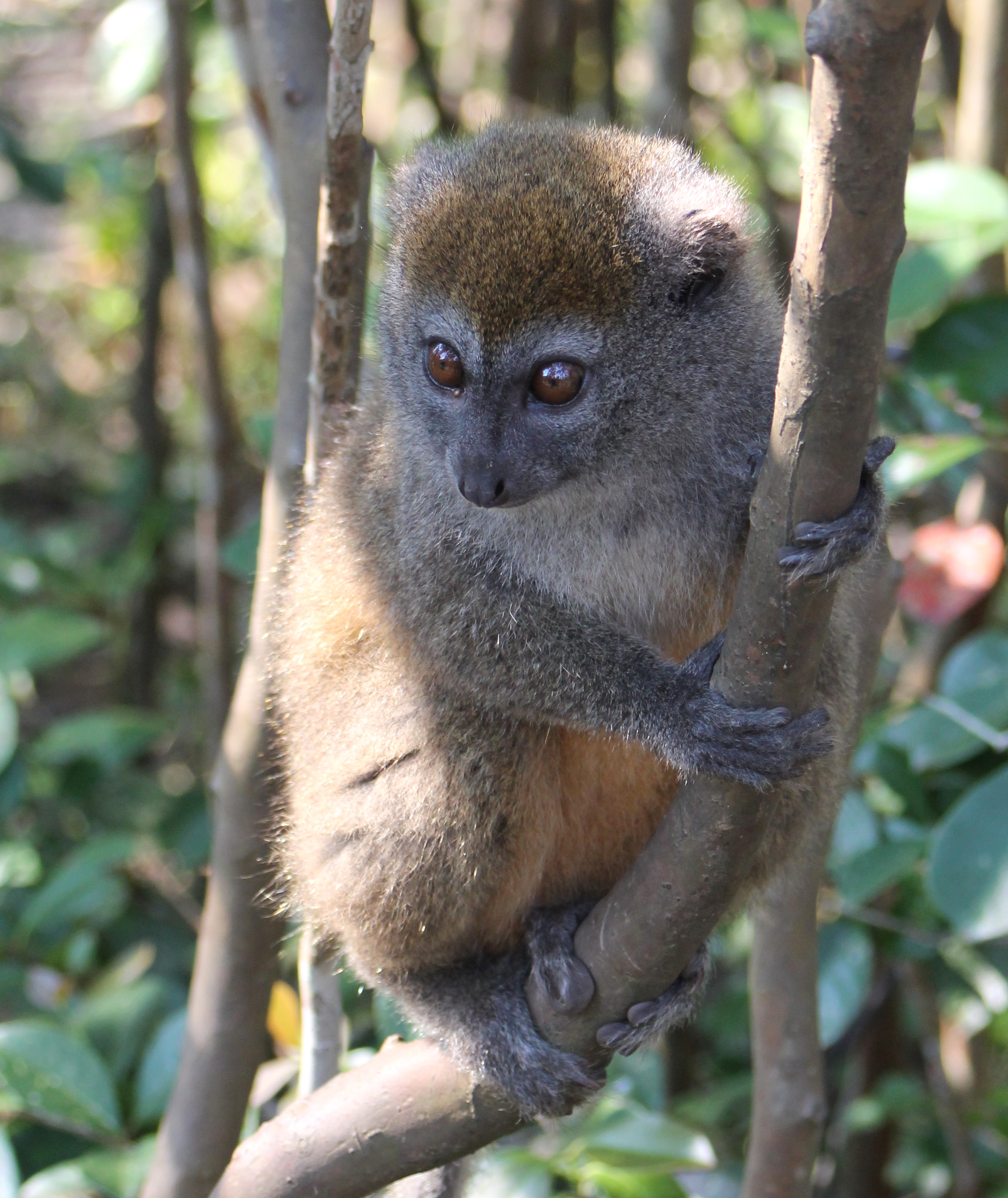 Grijze halfmaki op het Vakona-eiland